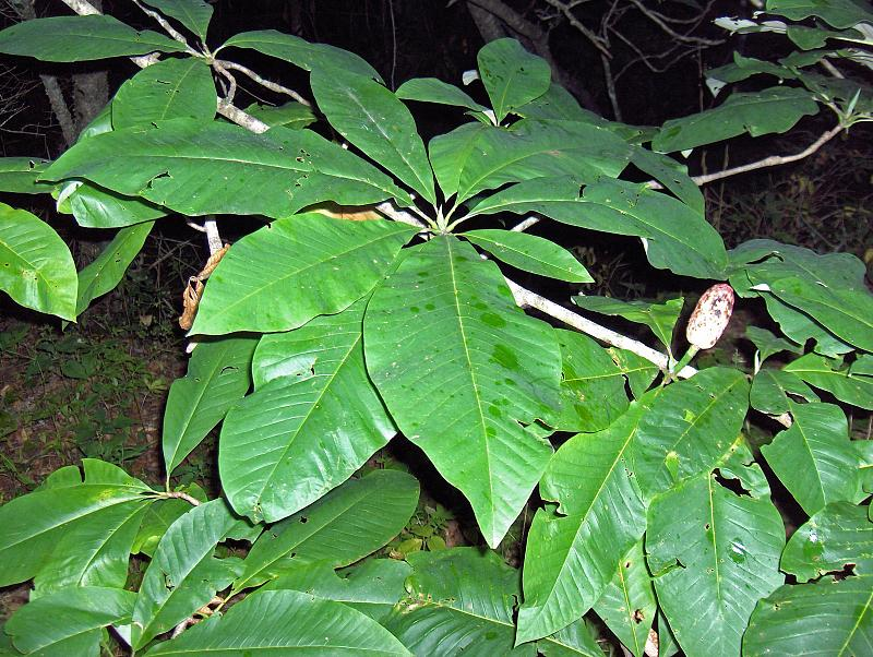 Umbrella Magnolia